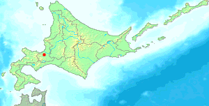 北海道内における札幌市中央区の位置を示した図（東区、および札幌市と兼用）。 画像:Hokkaido_map_small.pngとja:画像:Hokkaido_outline_small.pngを合成して、Birdmanが作成した。